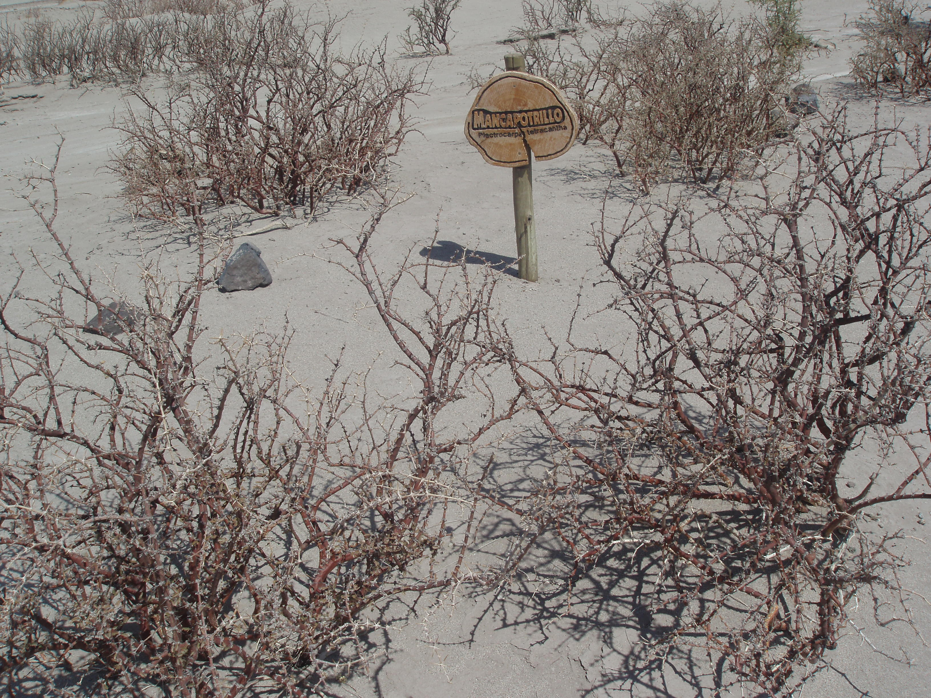 Plectrocarpa tetracantha, Parque Provincial Ischigualasto, Argentina